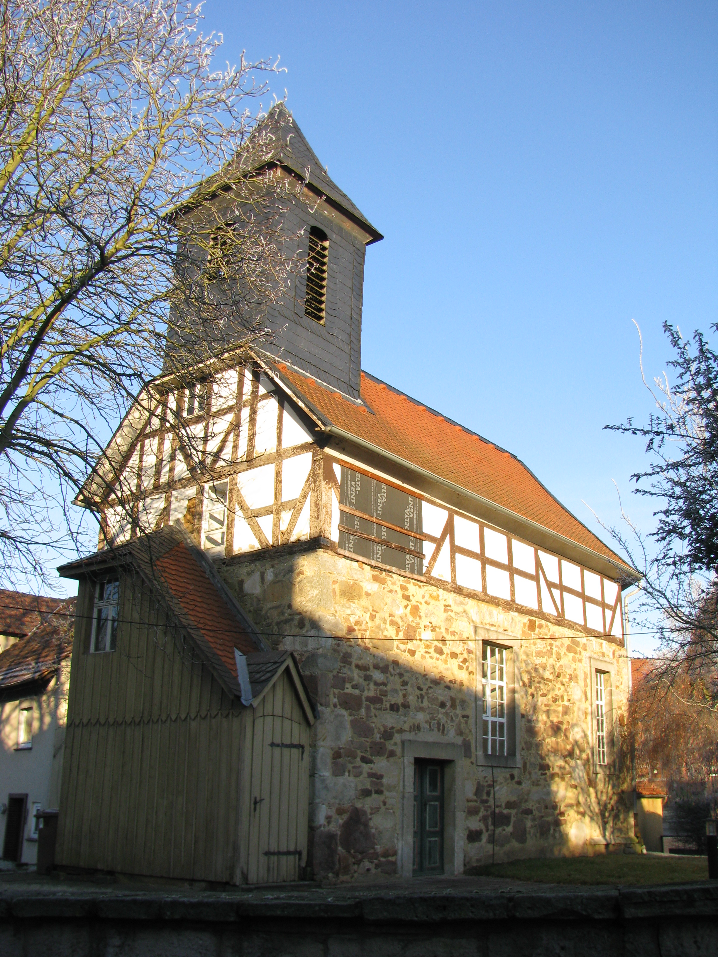 die Kirche in Fuldabrück-Dittershausen